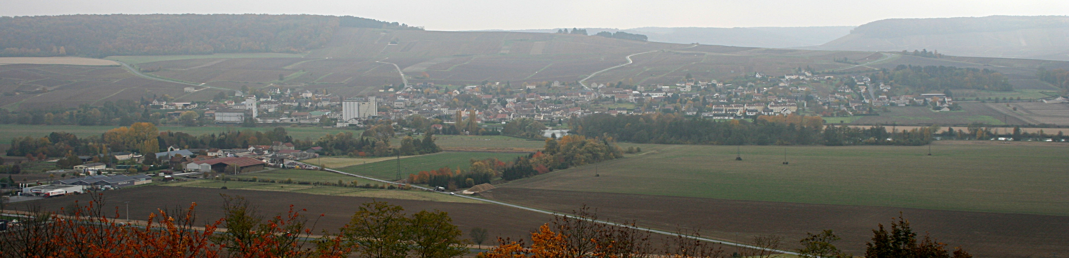 Vue de Port-à-Binson, hameau principal de Mareuil-le-Port (France). La rivière est La Marne.